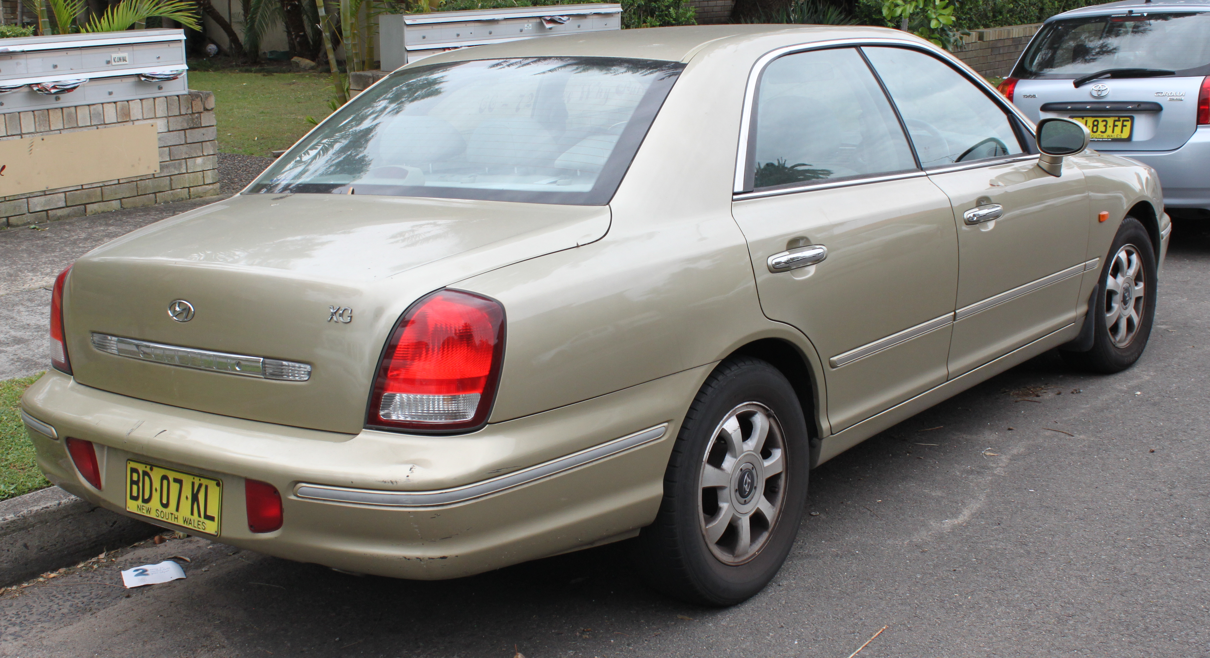 Hyundai Granduer XG